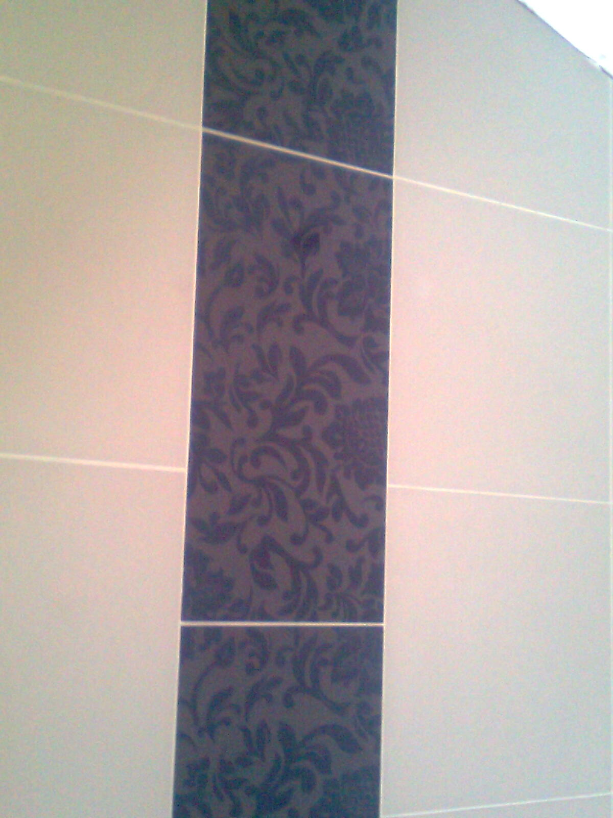 Фотография керамогранита